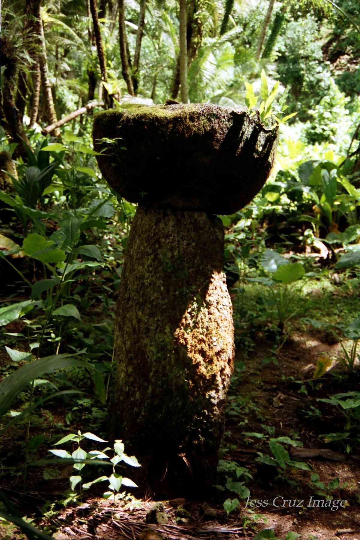 Latte stone at Haputo Beach, Guam